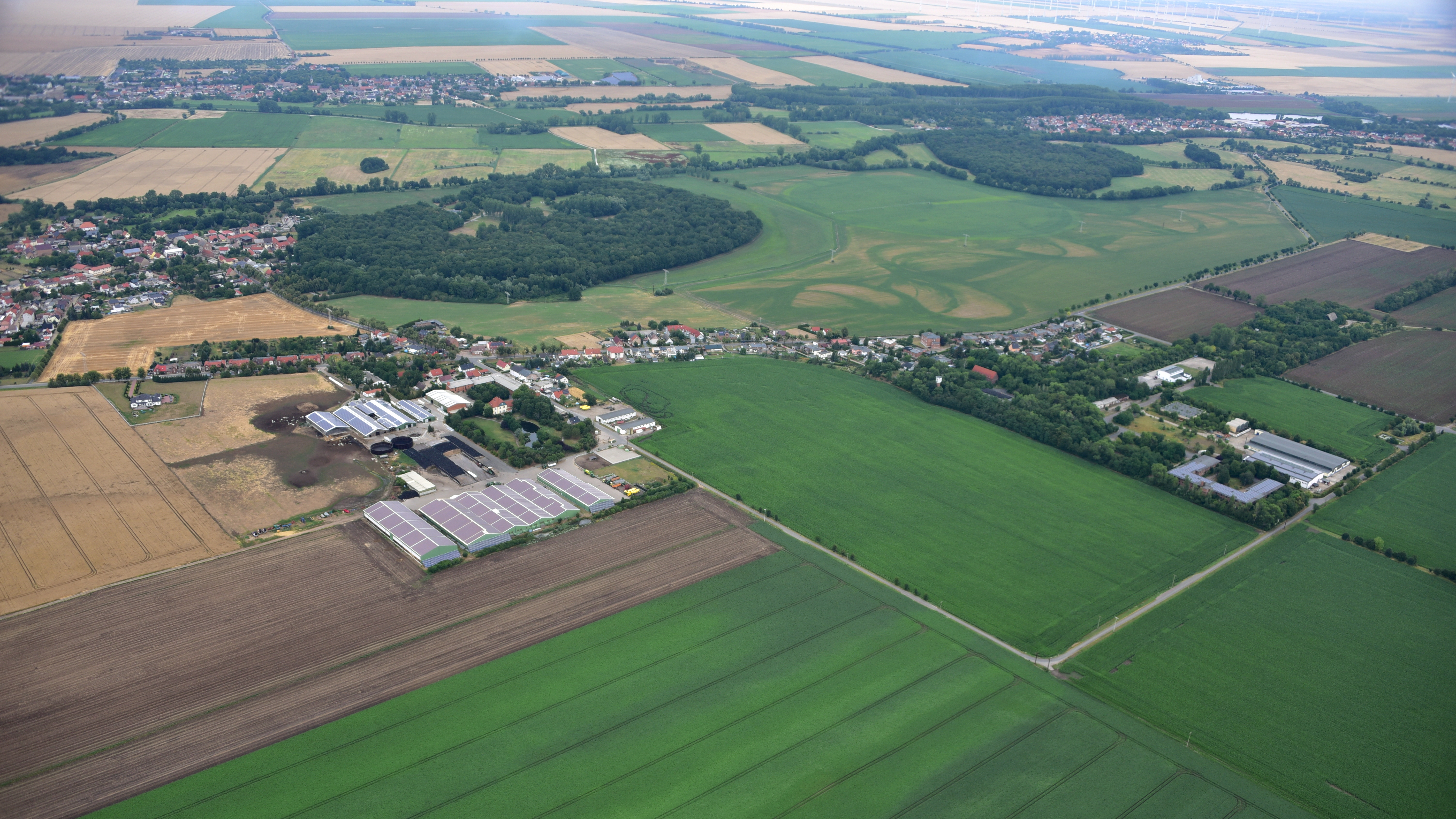 Tarthun, Luftaufnahme (2019)